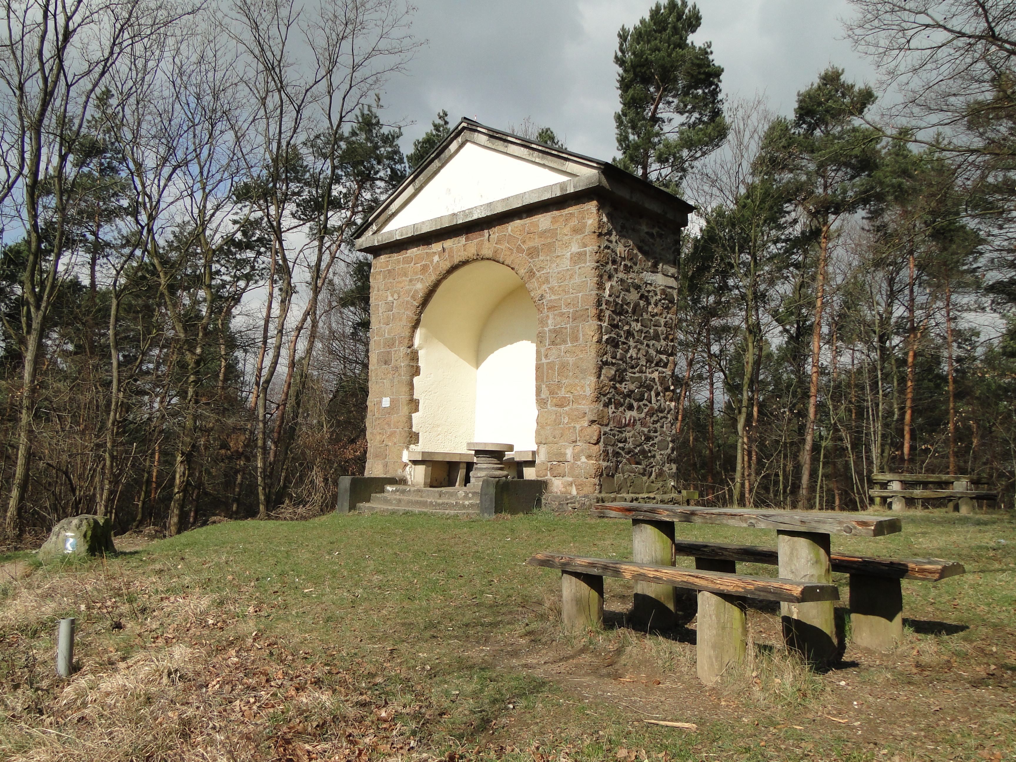 Foveaux-Häuschen im Küdinghovener Teil des Höhenzuges Ennert.